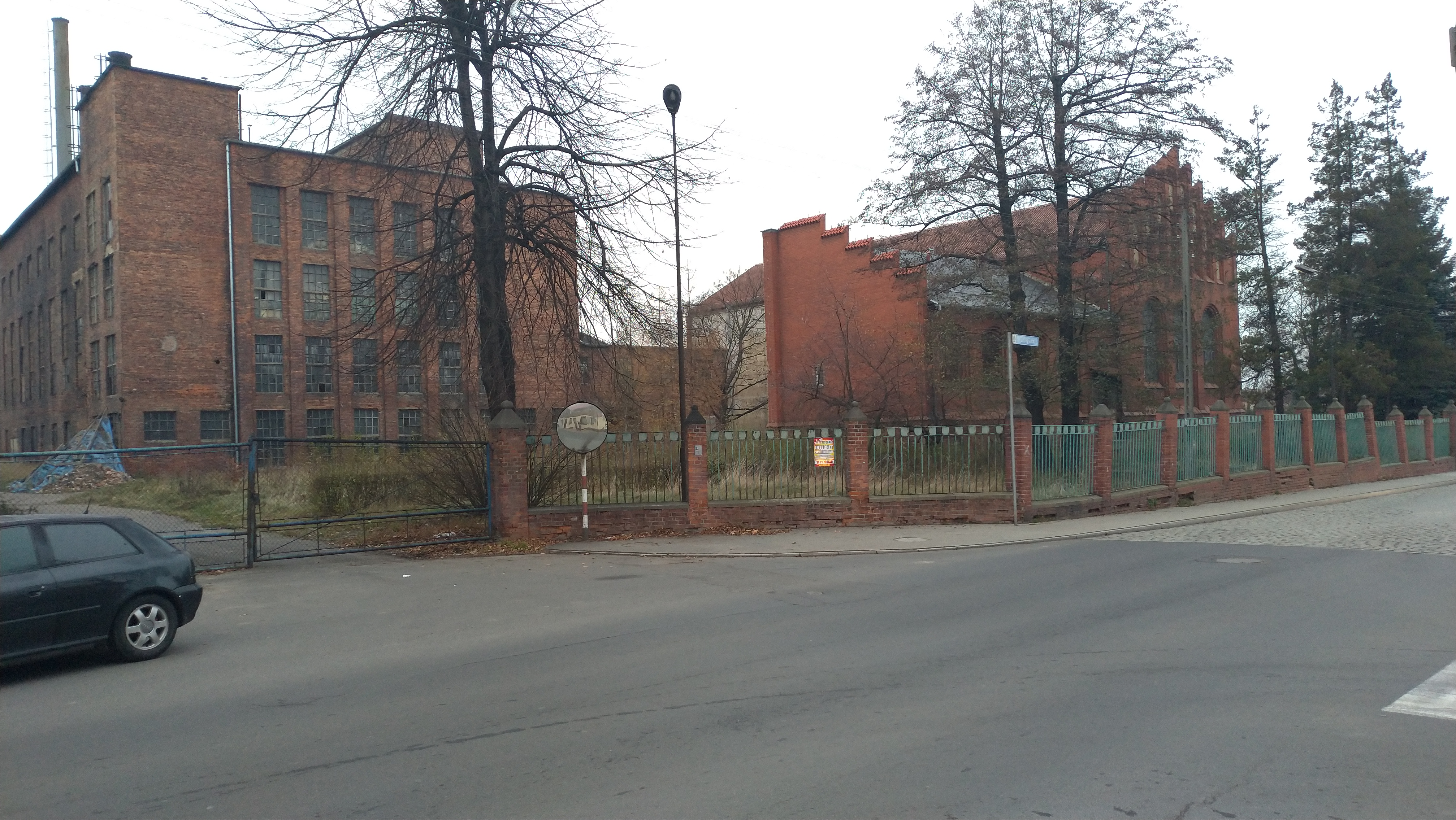 Siłownia ZPB "Frotex" w Prudniku.